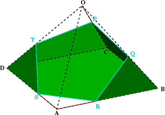 Auteur : Régis Lachaume